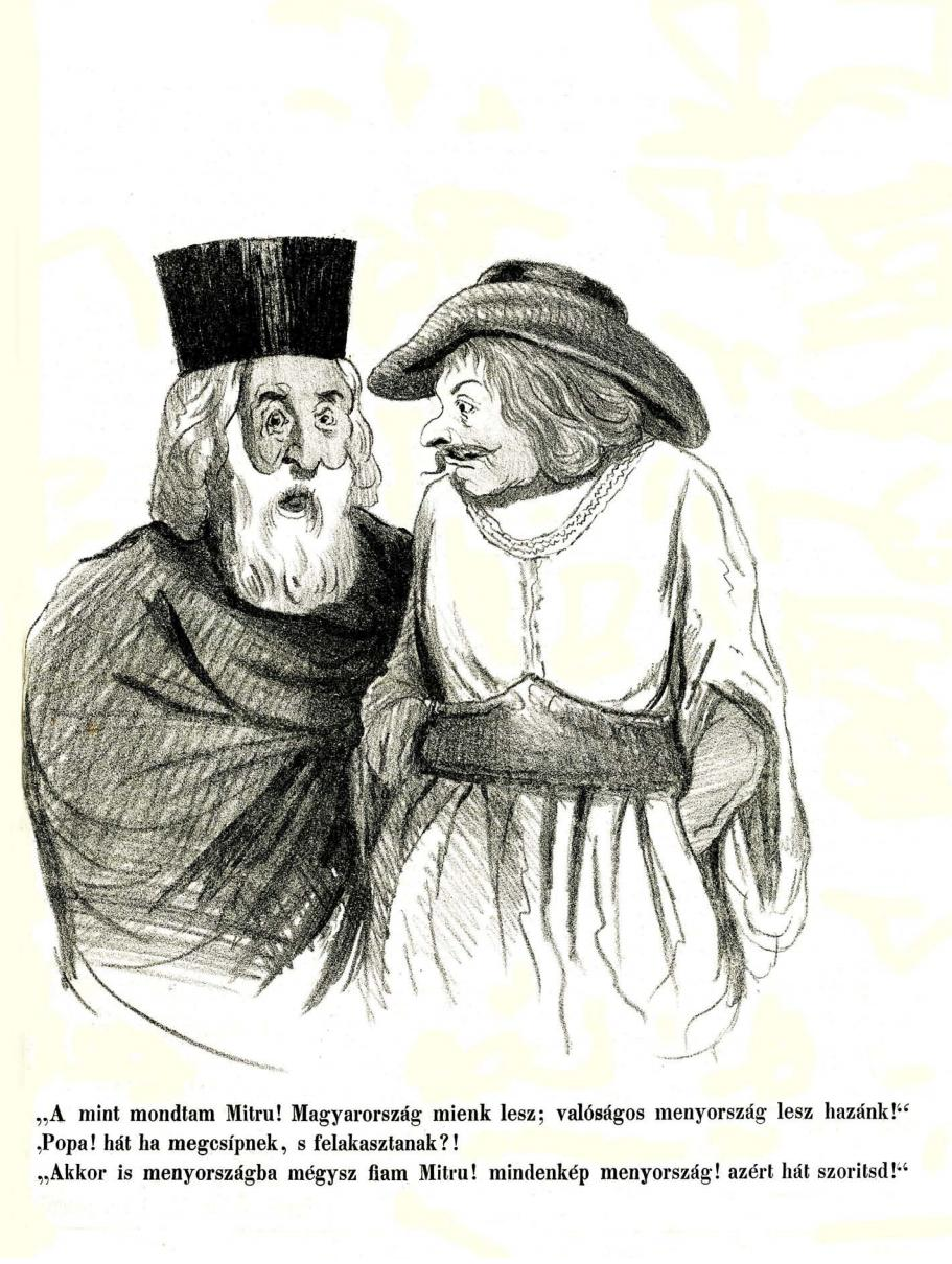 Szerelmey Miklós karikatúrája a Charivari (dongó) című élclap 12. számból